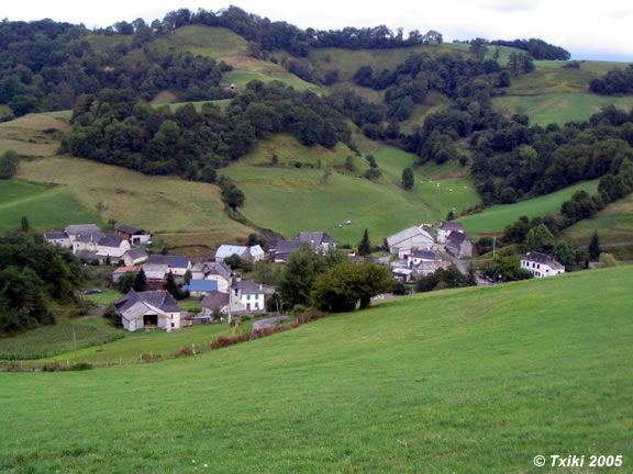 Village de Camou-Cihigue (Gamere) Pyrénées).